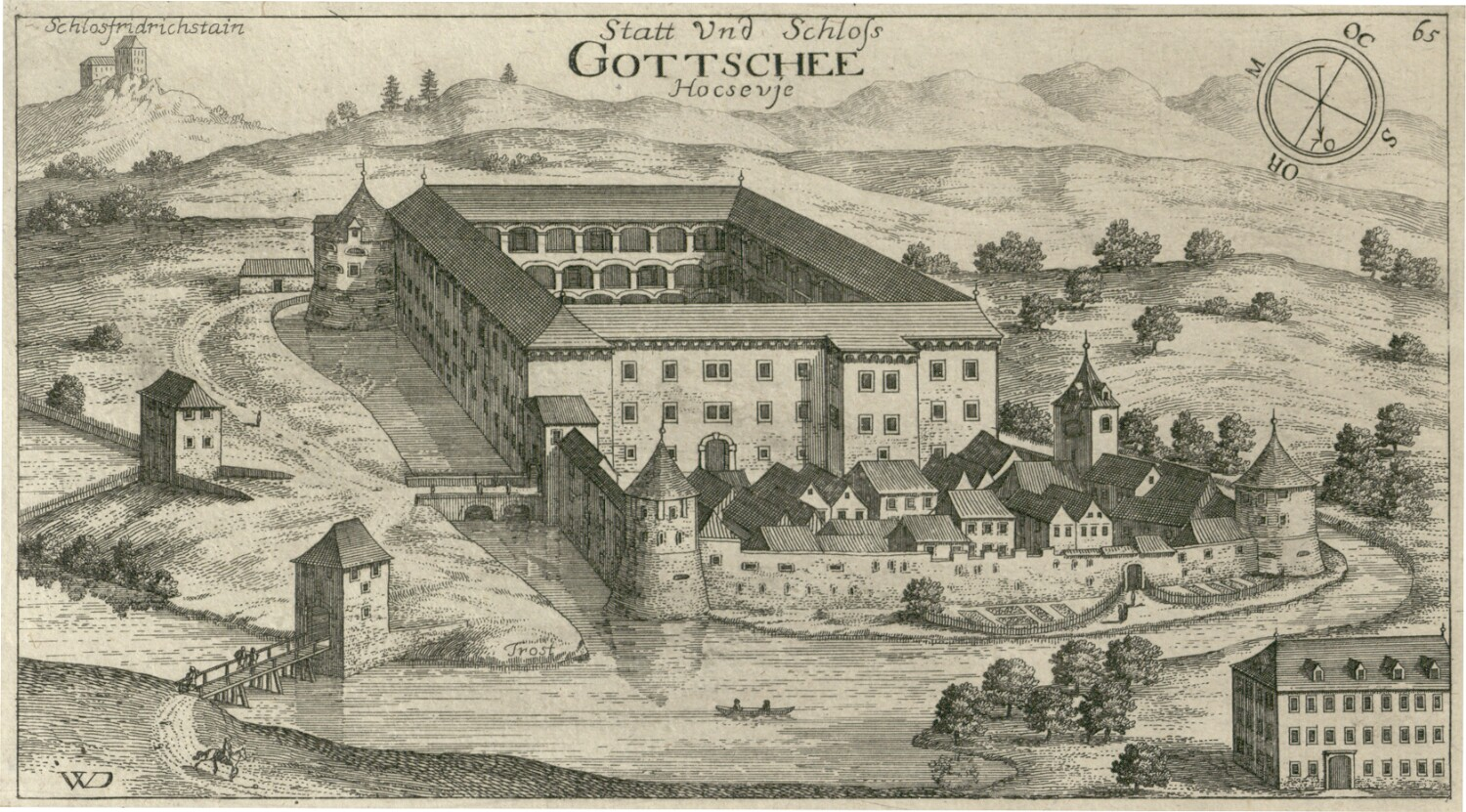 Grad in mesto Kočevje